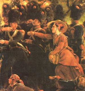 2 vivandières, détail de la Bataille de Chiclana.